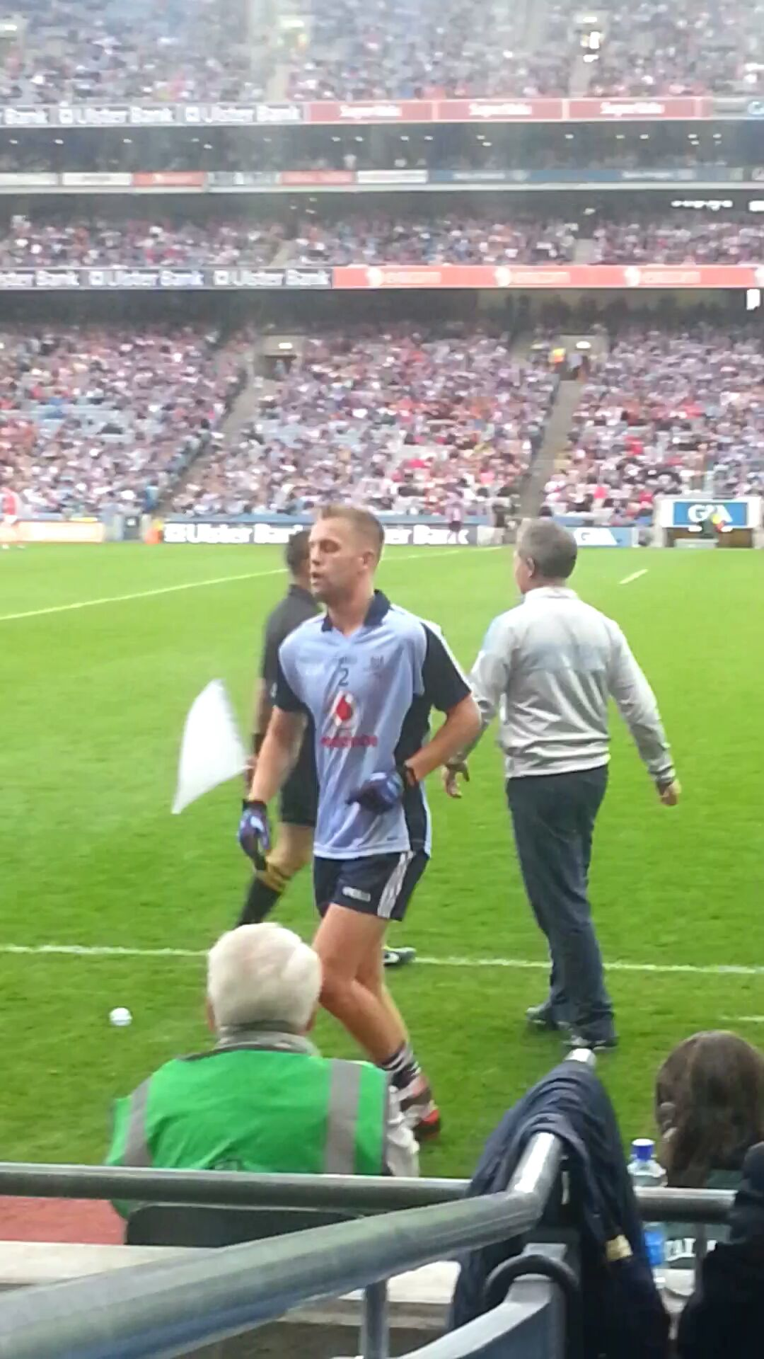 Jonny Cooper (Dublin GAA)